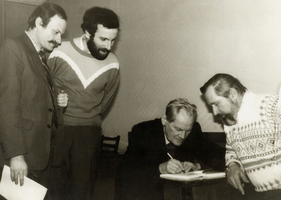 Поэт Борис Чичибабин на творческой встрече в Харьковской организации Союза композиторов Украины. Слева направо: Г.Ганзбург, А.Гринберг, Б.Чичибабин, А.Гайденко.